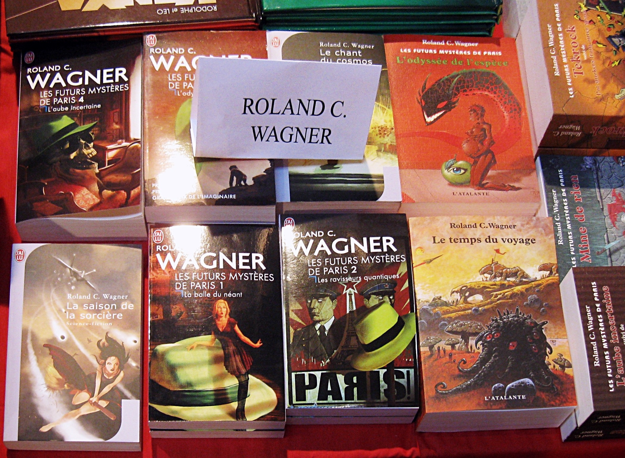 Quelques oeuvres de Roland C. Wagner (sur le stand de la libairie Omerveilles de Grenoble site web), dec. 2010, 7emes rencontres de l'imaginaire, Sevres, 92, France